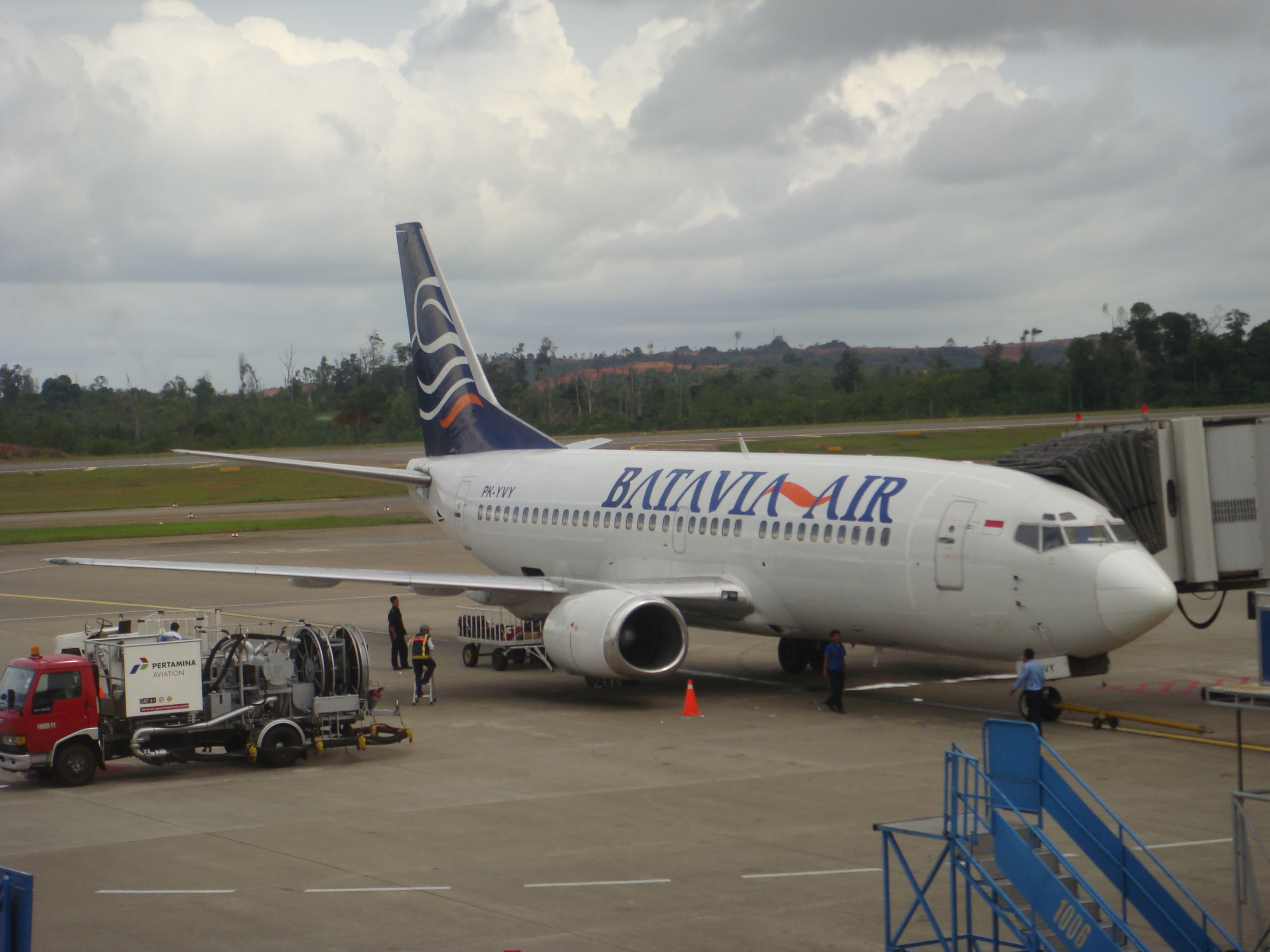 バタビア航空 B737-3B7 PK-YVY (2008.08.29に投稿者がハン・ナディム空港（バタム）にて撮影)